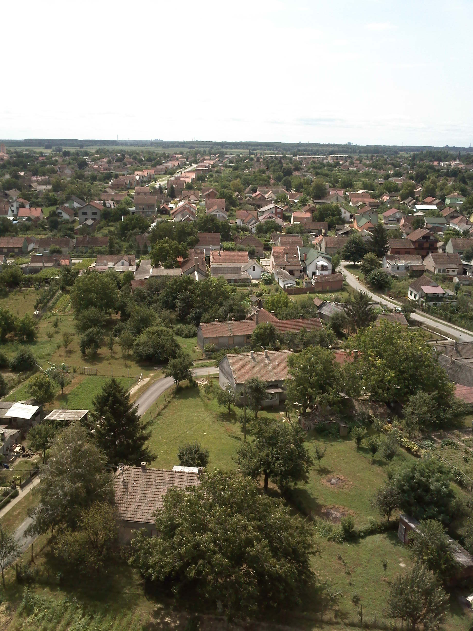 Darda, Croatia